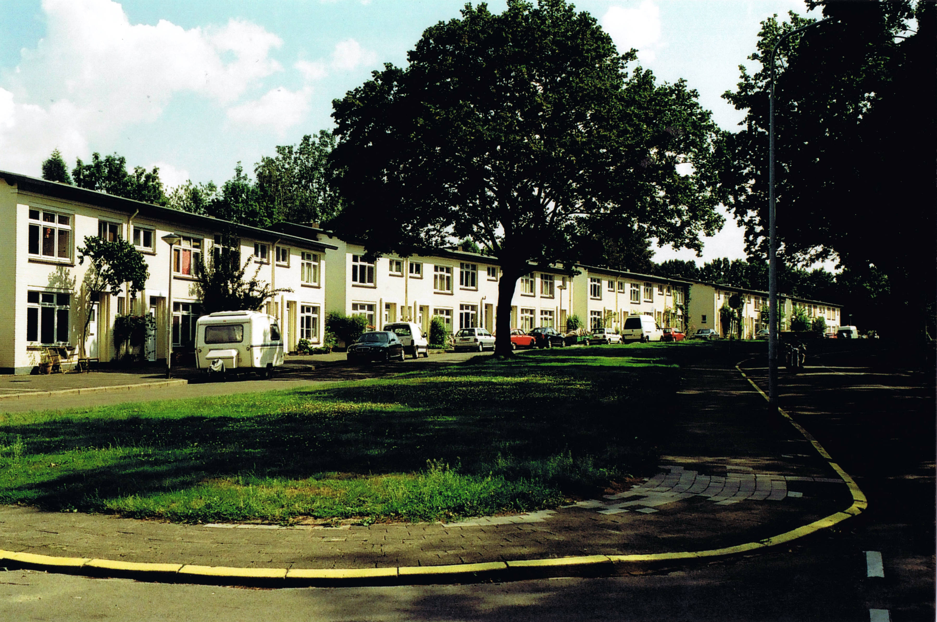 Maastricht 2007 Woonschool de Ravelijn